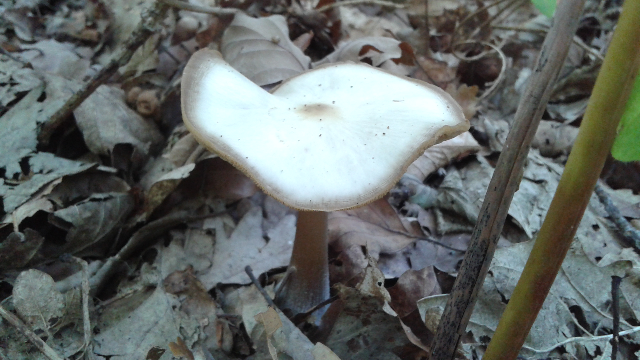 collybie beurrée, collybia butyracea var. asema (nord pas de calais) vue de dessus par temps sec